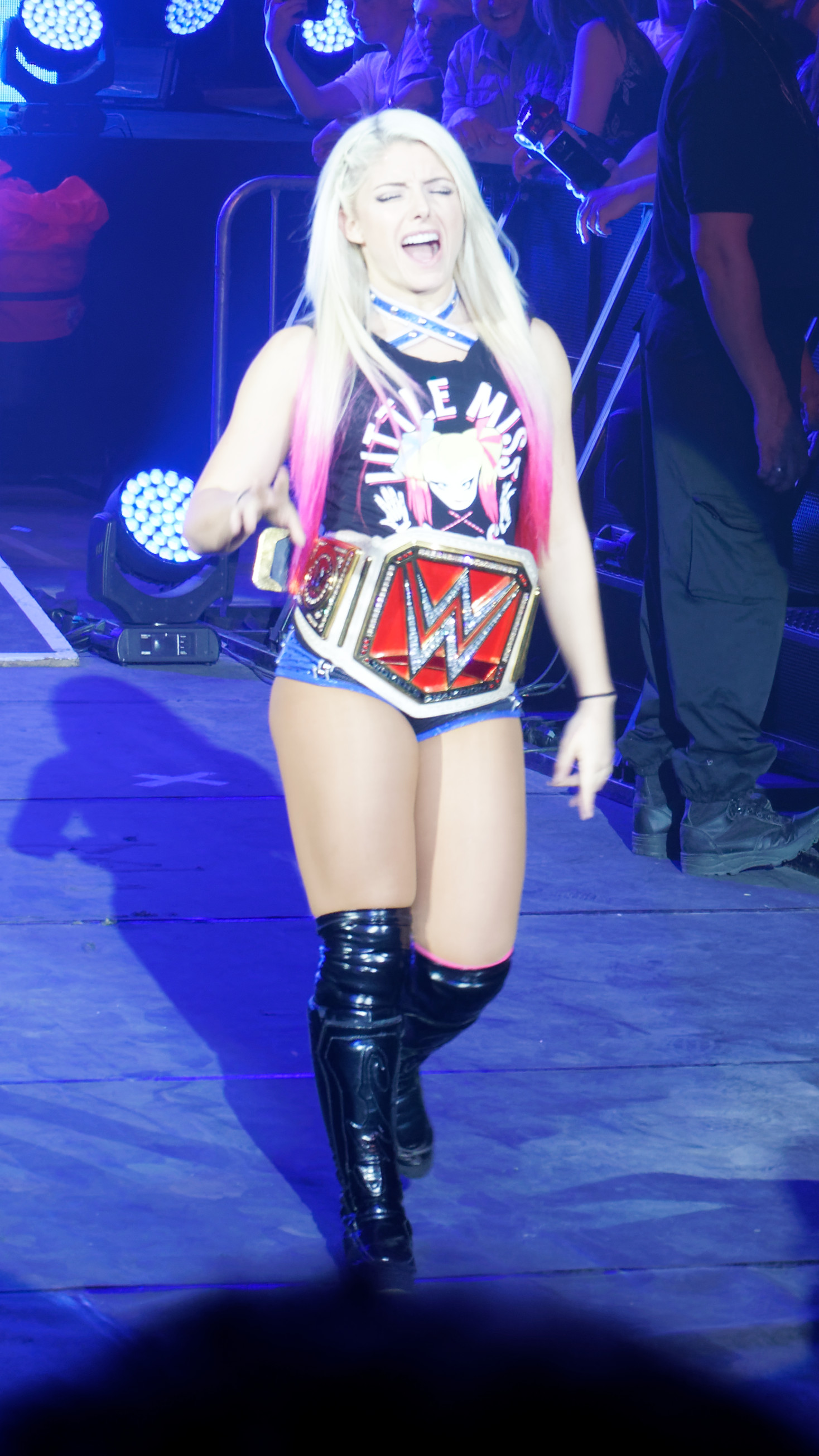 Alexa Bliss (c) defeats Bayley Info on the match : WWE RAW Women's Title Match ( Le vendredi 12 mai, la WWE Live Tour fera escale au Country Hall a Liege pour le spectacle de catch de l'annee! Au programme: des duels impitoyables et des rencontres captivantes entre les meilleures equipes et les plus grands rivaux. )